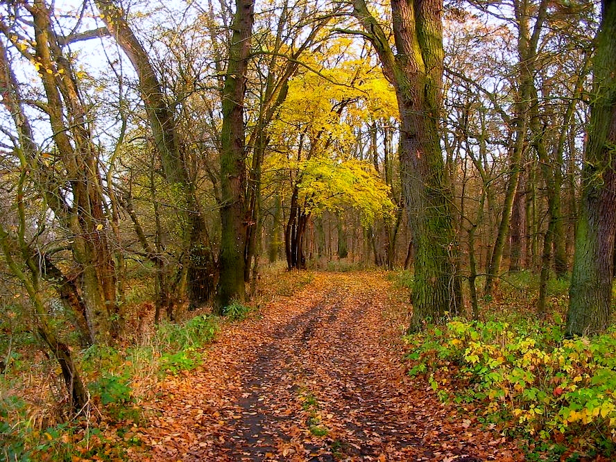 Scieżka leśna Zielonogórskiego Lasu Odrzańskiego autor:Mohylek